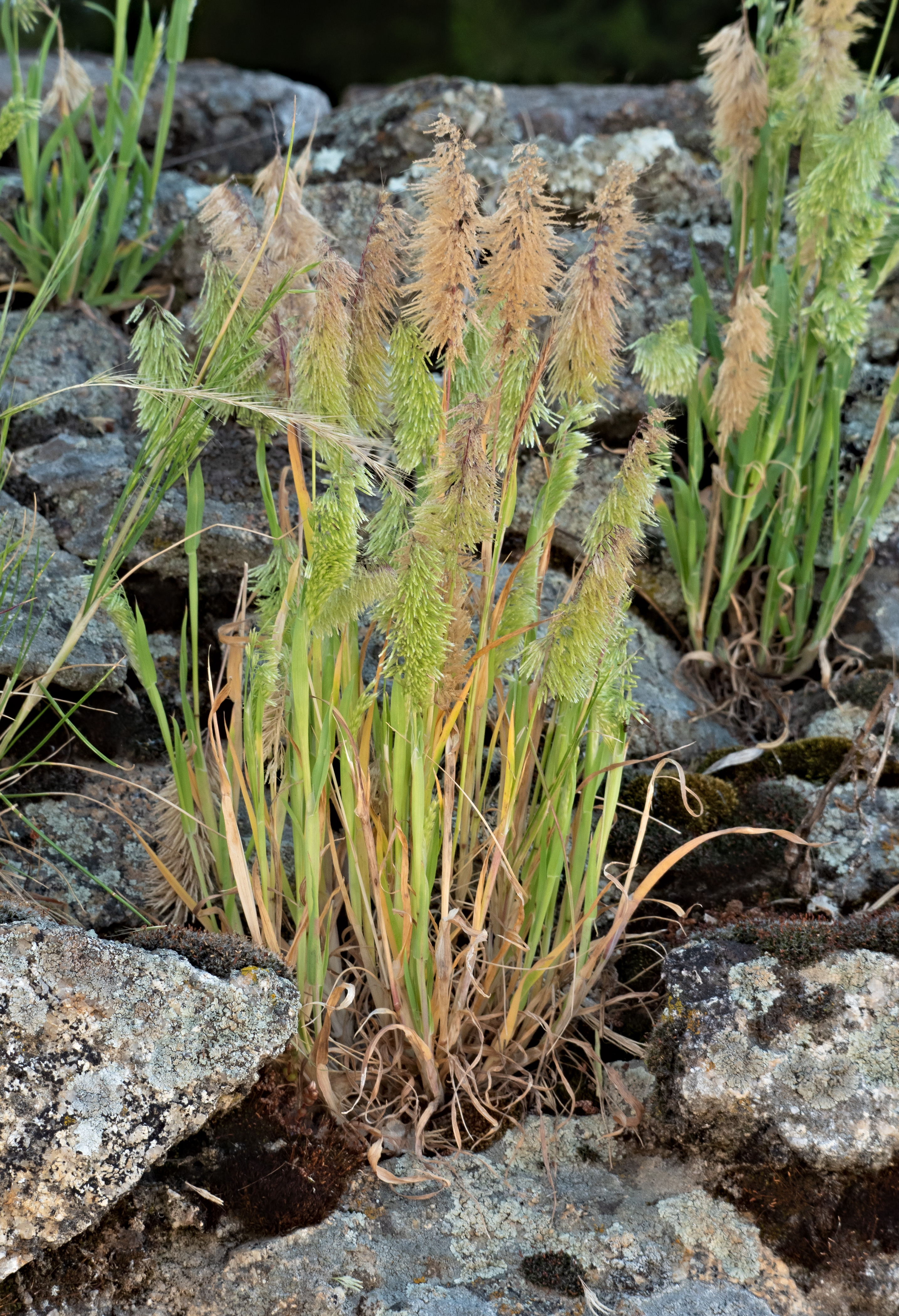 Lamarckia aurea. Losar de la Vera (Cáceres, España).